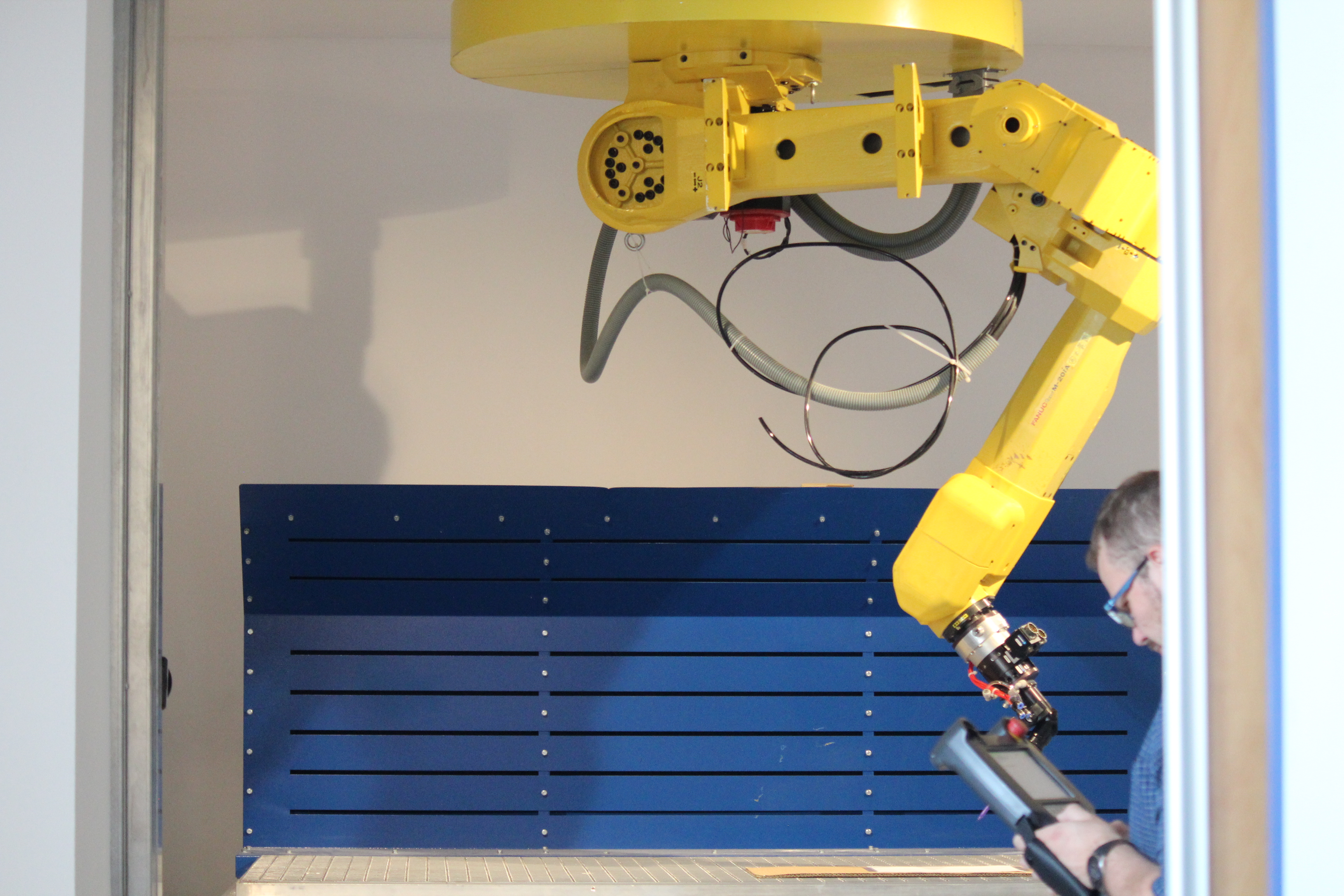 Robot przemysłowy na Wyspie Ostrów